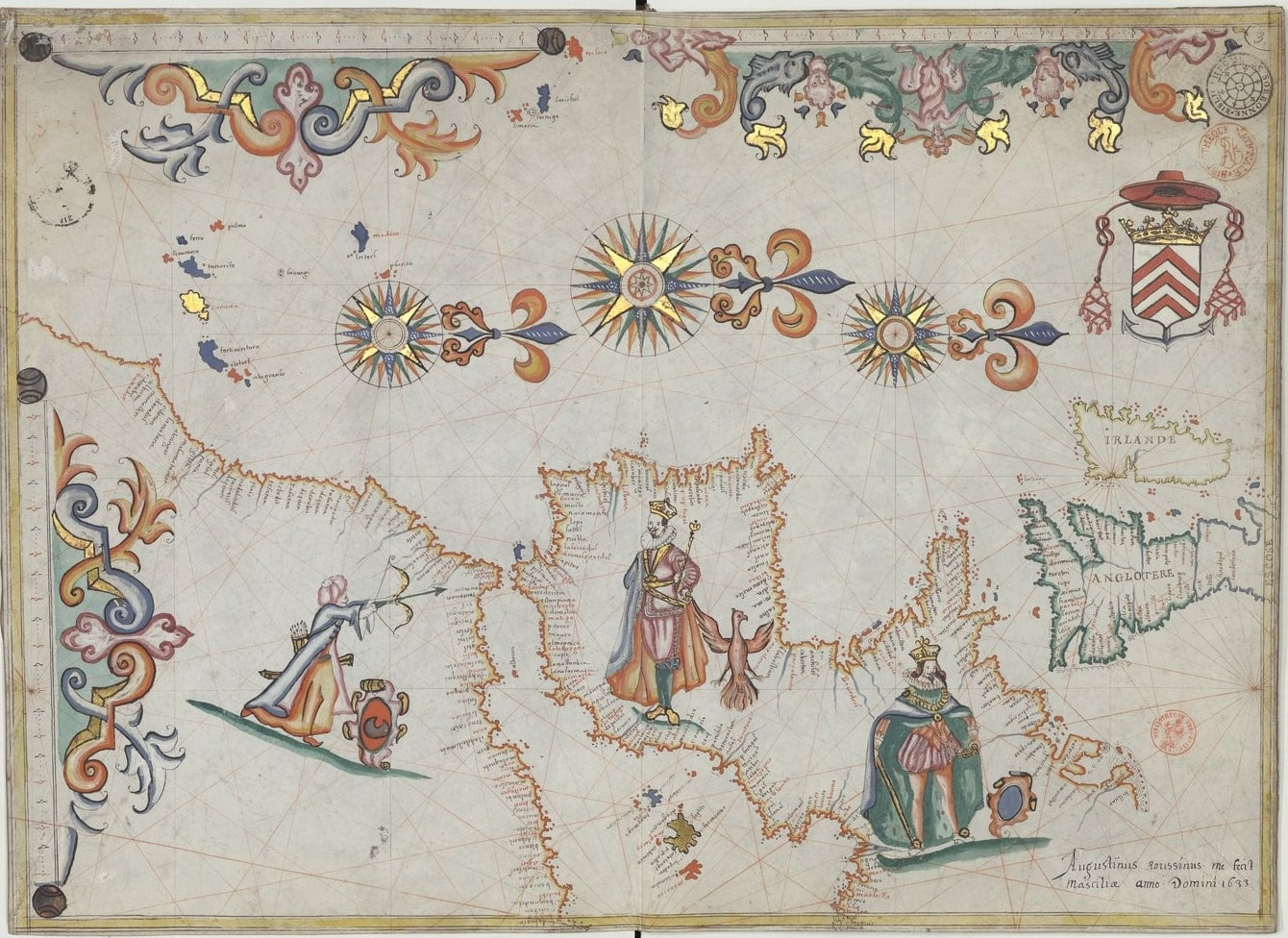 Le Maure et le roi d'Espagne Carte du littoral Atlantique et du détroit de Gibraltar (détail) Augustin Roussin, Marseille, 1633. L'image résume les rapports de force en Méditerranée vers 1633. Un archer maure (représentant le sultan d'Alger), bande son arc et pointe sa flèche en direction du roi d'Espagne, Philippe IV qui regarde vers lui, tandis qu'en retrait le roi de France Louis XIII semble les surveiller du coin de l'œil. Manuscrit enluminé sur parchemin, 35 x 51,5 cm Bibliothèque nationale de France, département des Manuscrits, Français 20122, f. 2v-3